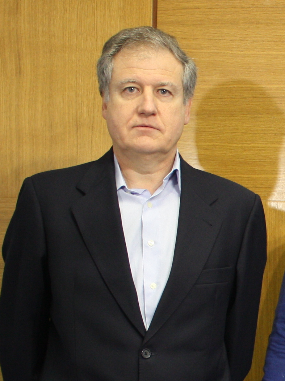 Eduardo Arasti, ha presentado en rueda de prensa la Ponencia Económica del 12º Congreso Autonómico. Le acompañaron en la rueda de prensa el resto de redactores de la ponencia, Carlos Caramés, Daniel Cosgaya, y Carlos García Diego